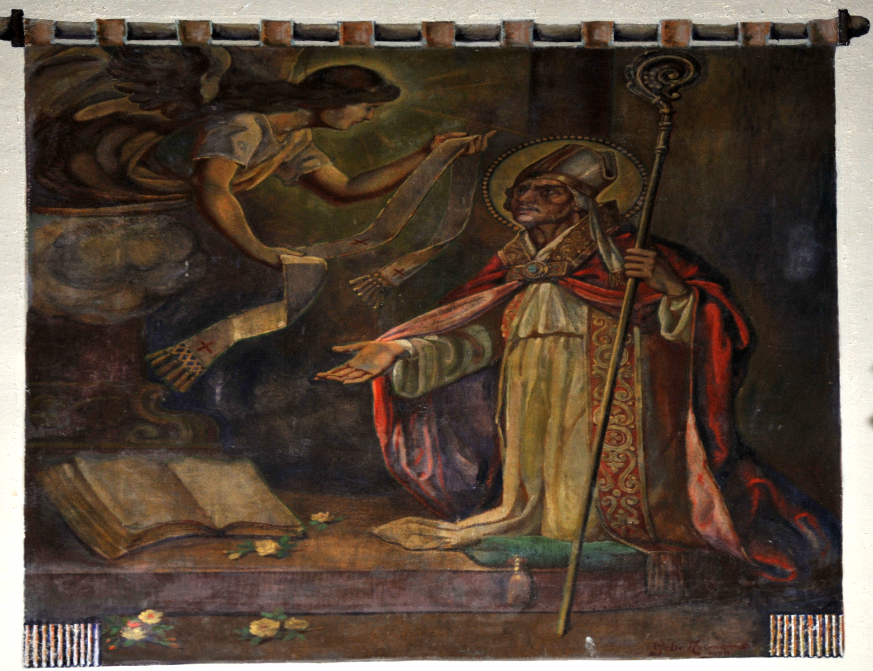 Wandteppech mat der Duerstellung vum Andrea da Segni an der Kierch zu Peppeng.